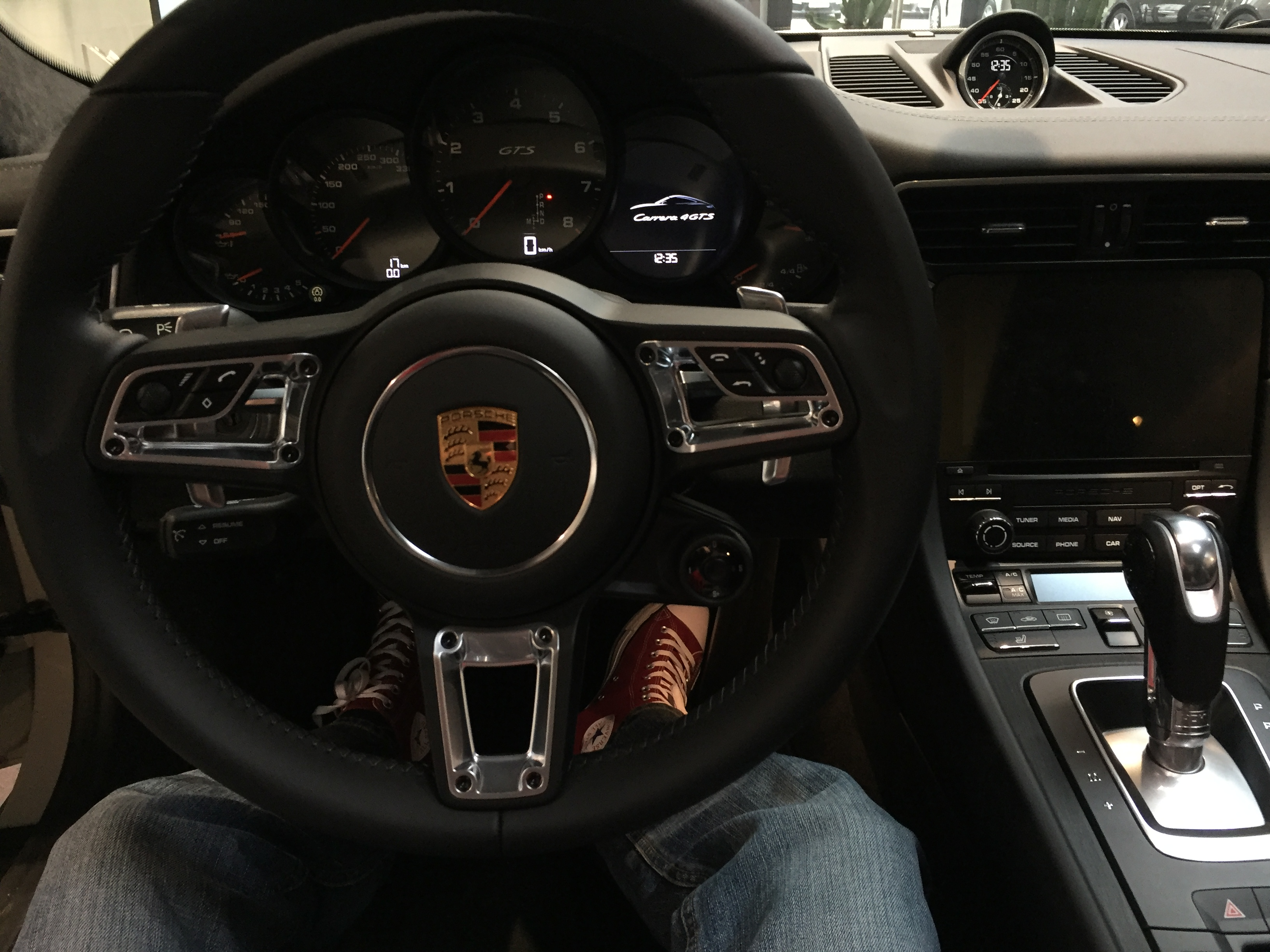 Porsche 991.2 Carrera 4 GTS - Cockpit